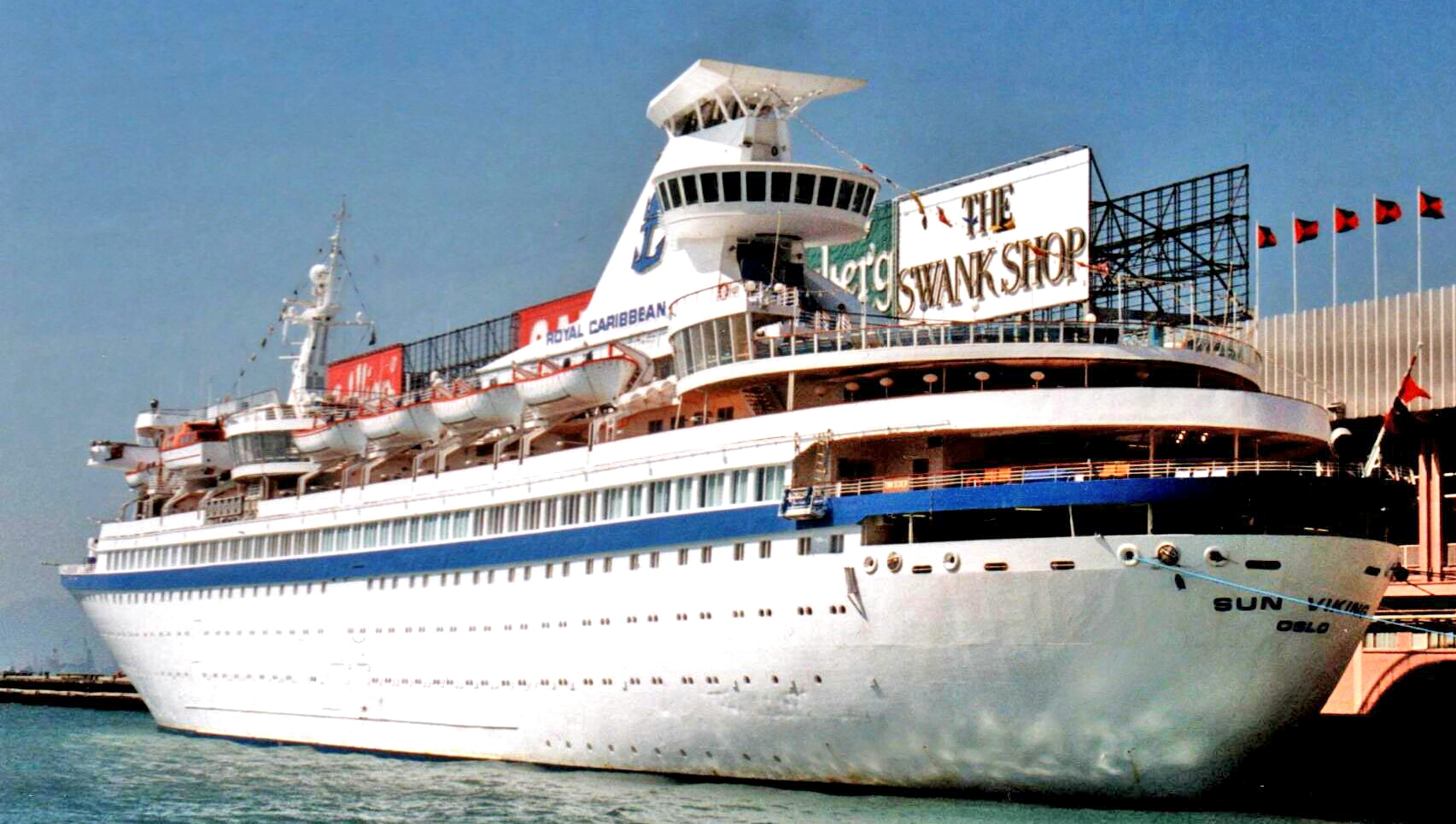 The MS Sun Viking at Ocean Terminal, Hong Kong.